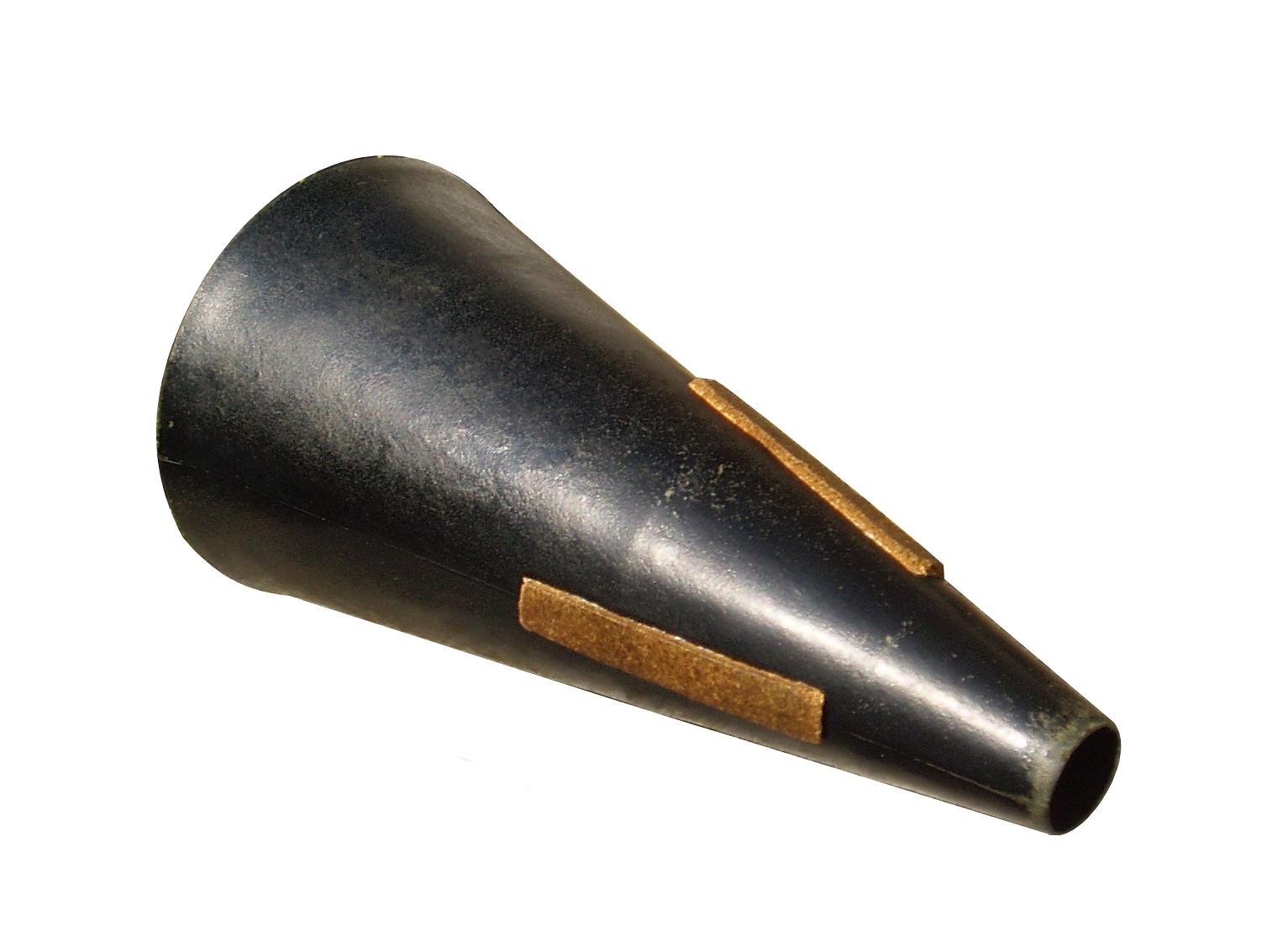 S.W. LEWIS ORCHESTRAL HORNS